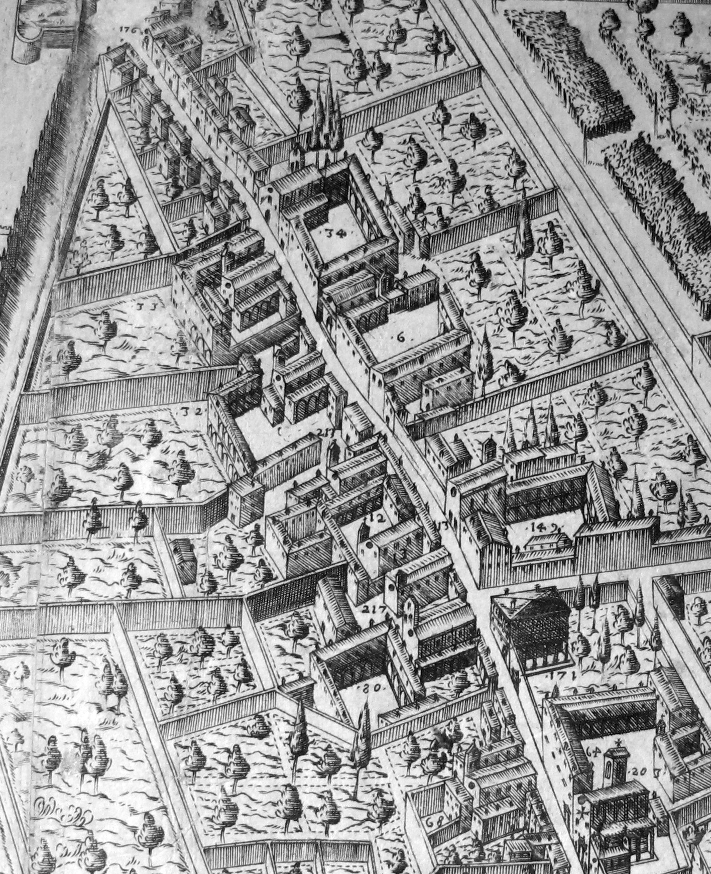 Pianta del buonsignori, dettaglio via san gallo, parte alta